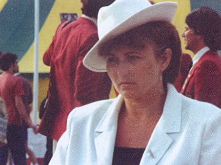 Barbara Tomaszewska w reprezentacyjnym stroju